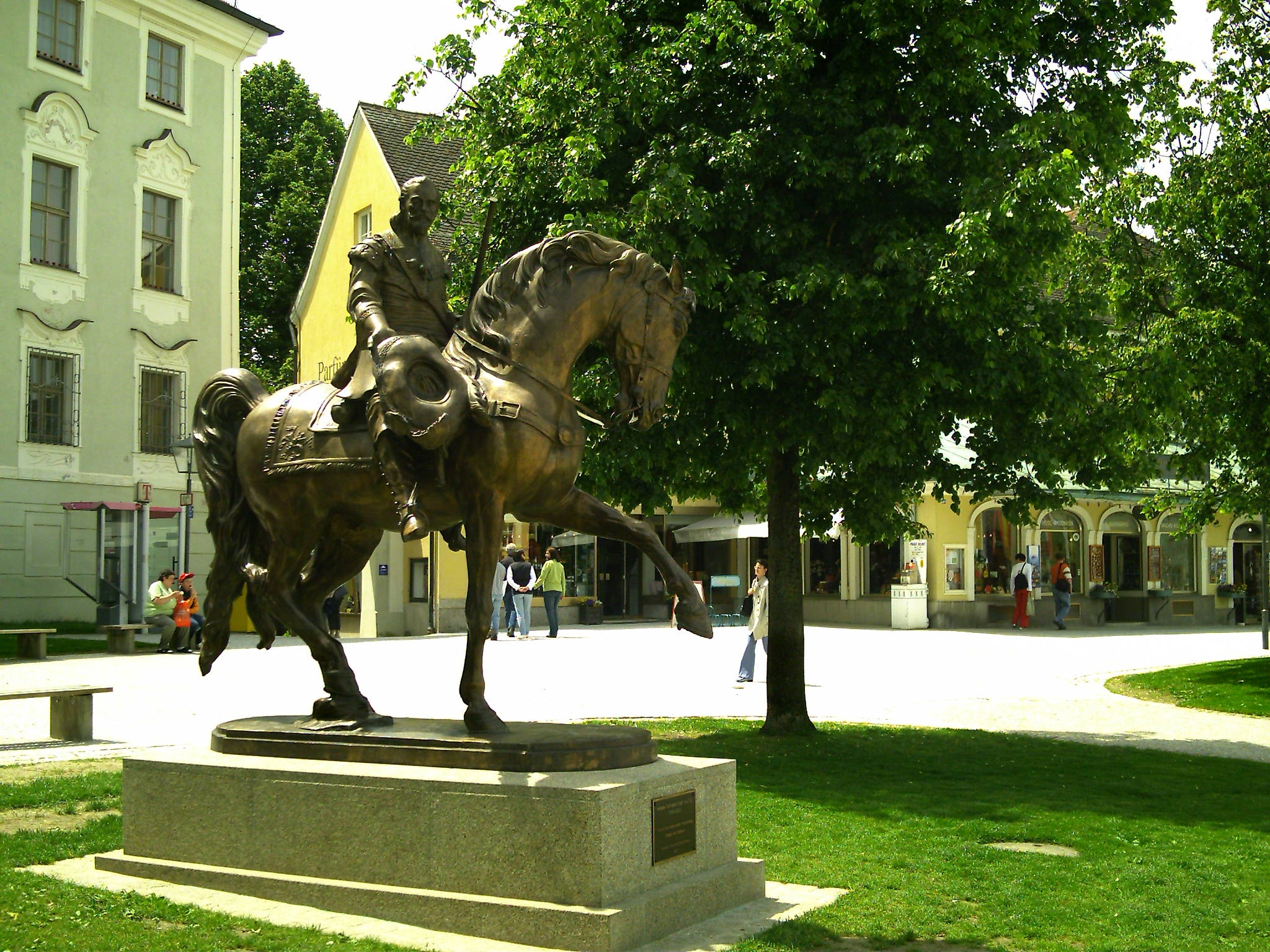 Tilly: Heerführer der Katholischen Liga und neben Wallenstein einer der namhaftesten Feldherrn des Dreißigjährigen Kriegs. Aufgenommen auf dem Kapellplatz in Altötting/Bayern